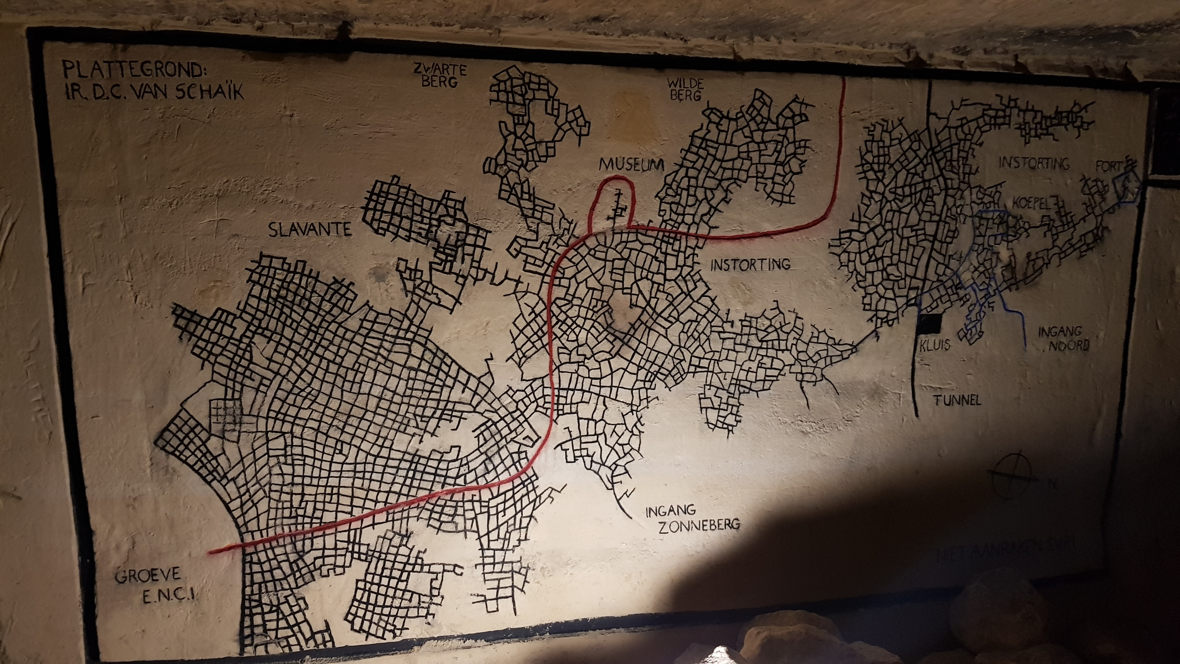 plattegrond in Noordelijk Gangenstelsel in de Sint-Pietersberg, Maastricht, Nederland